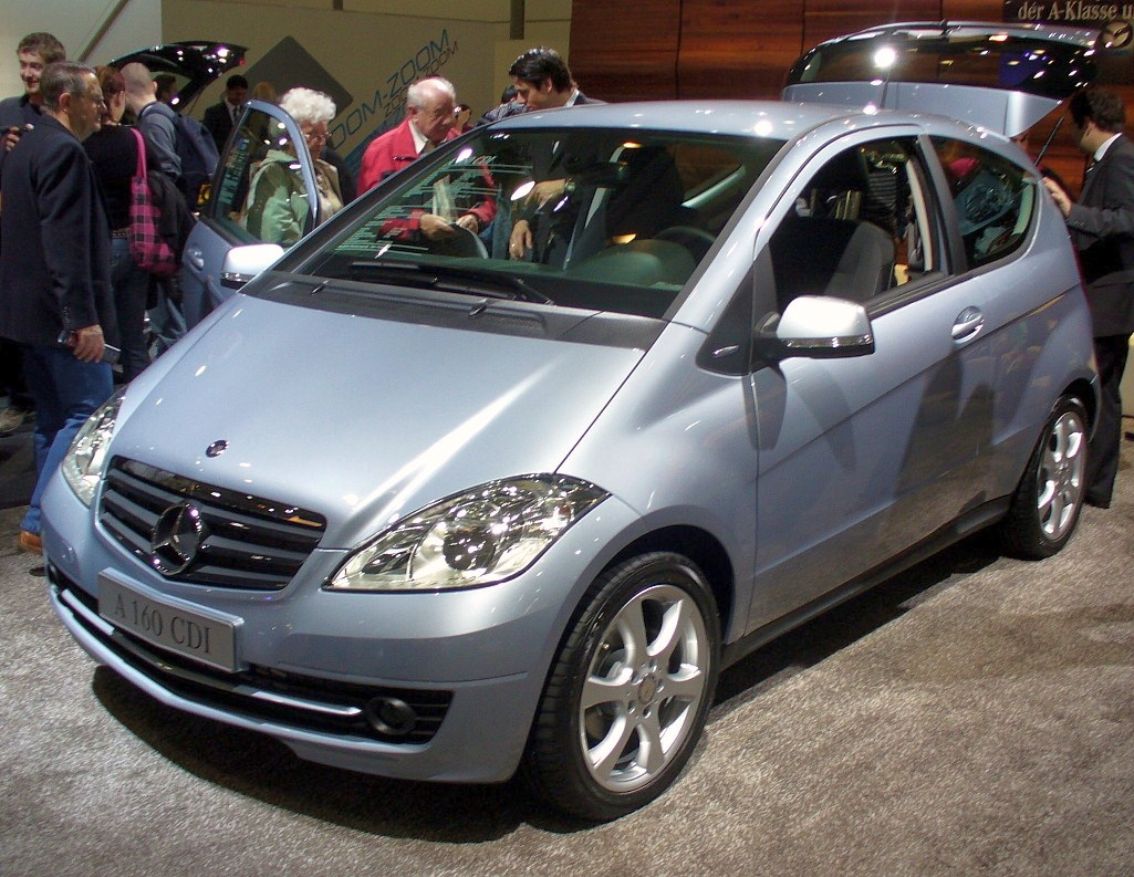 Mercedes-Benz C169 Facelift